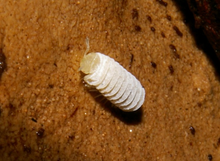 Trachysphaera lobata en vue dorsale